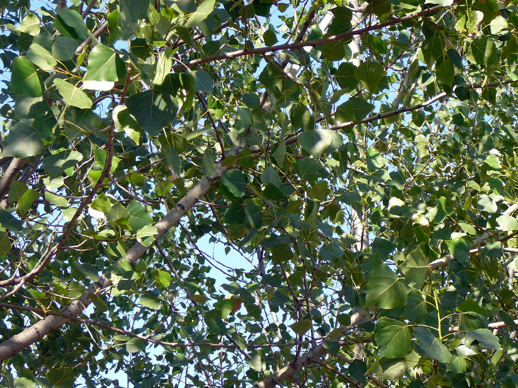 Populus × canadensis